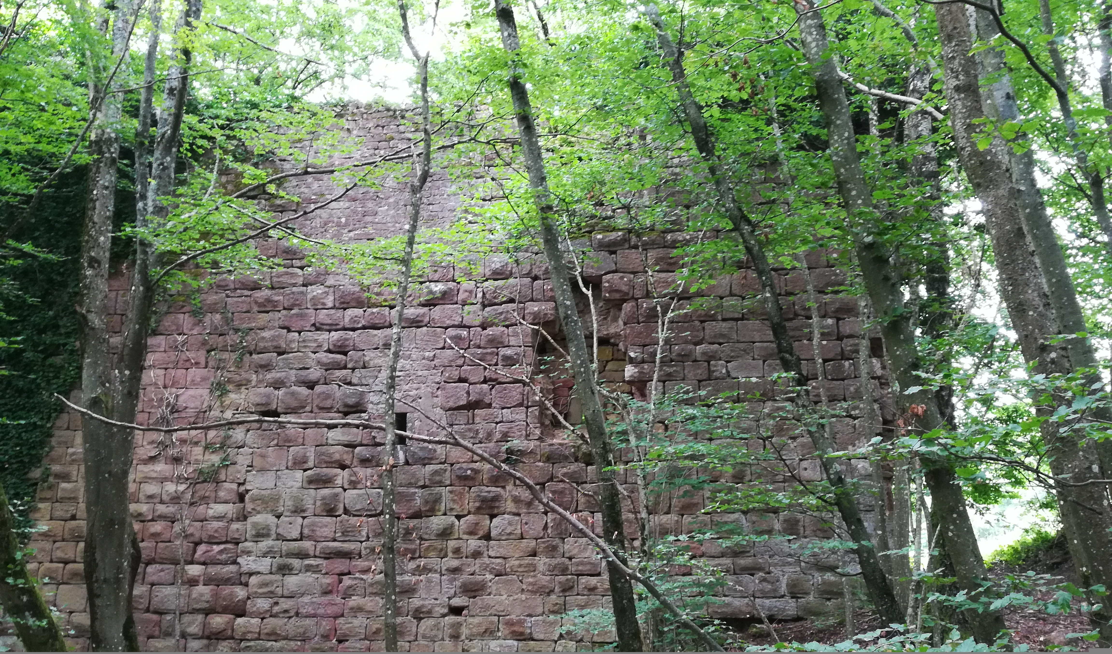 Pierres à bossages, latrines.